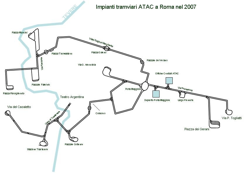 Impianti tramviari di Roma